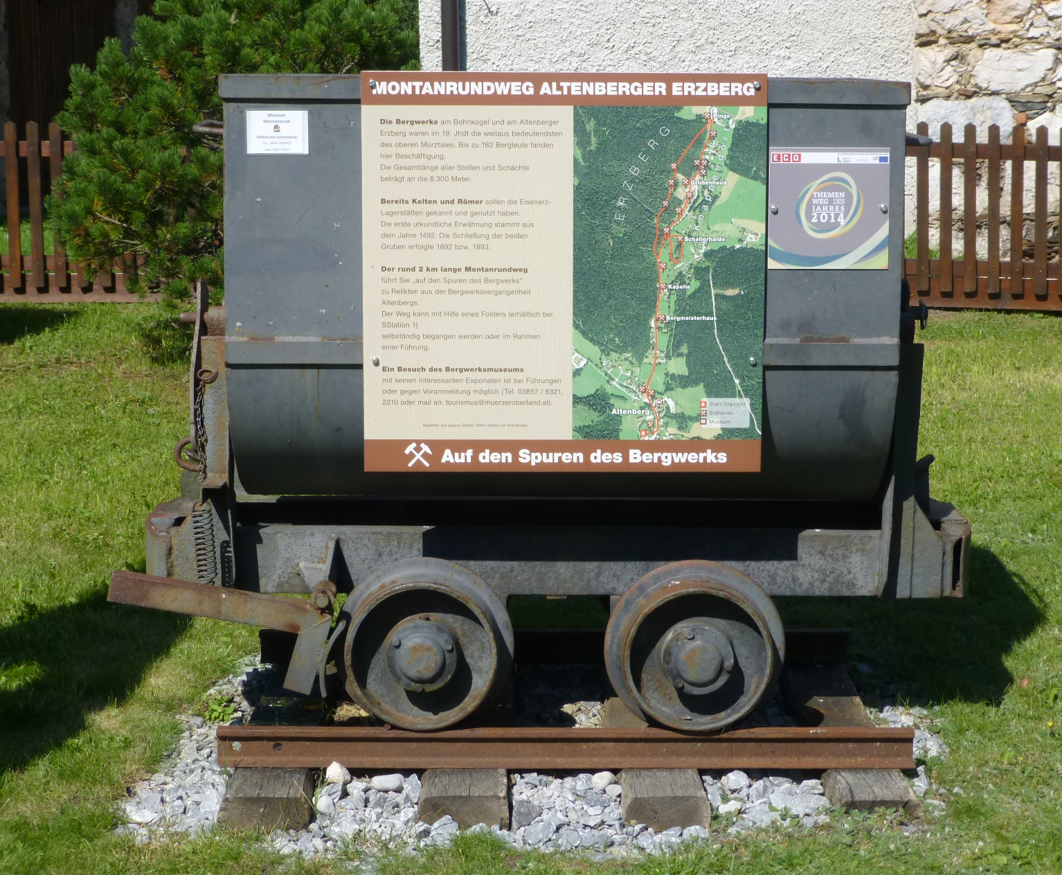 Invitation à faire le chemin au souvenir des mineurs Auf den spuren..., Altenberg an der Rax, Styrie.